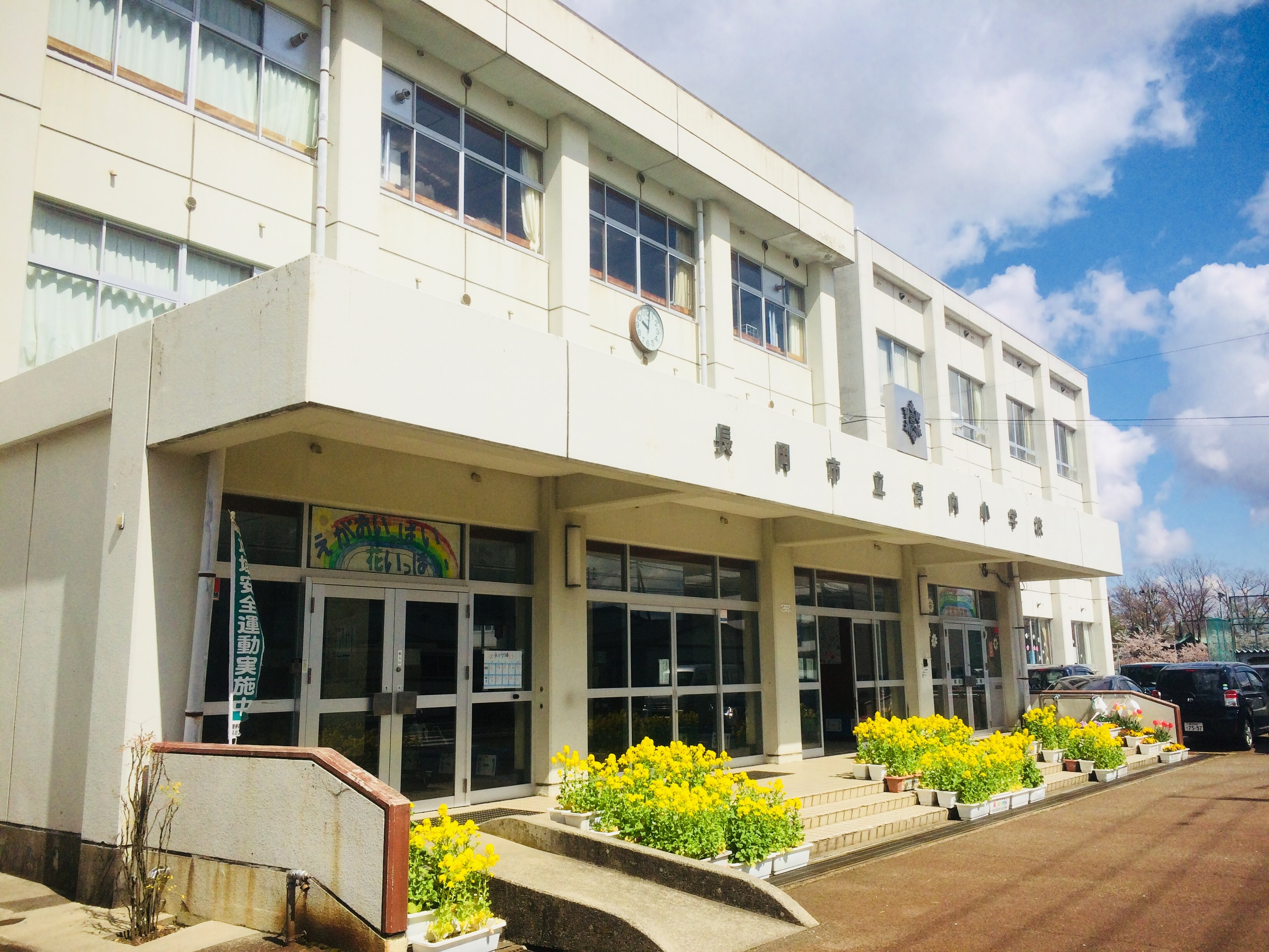 宮内小学校